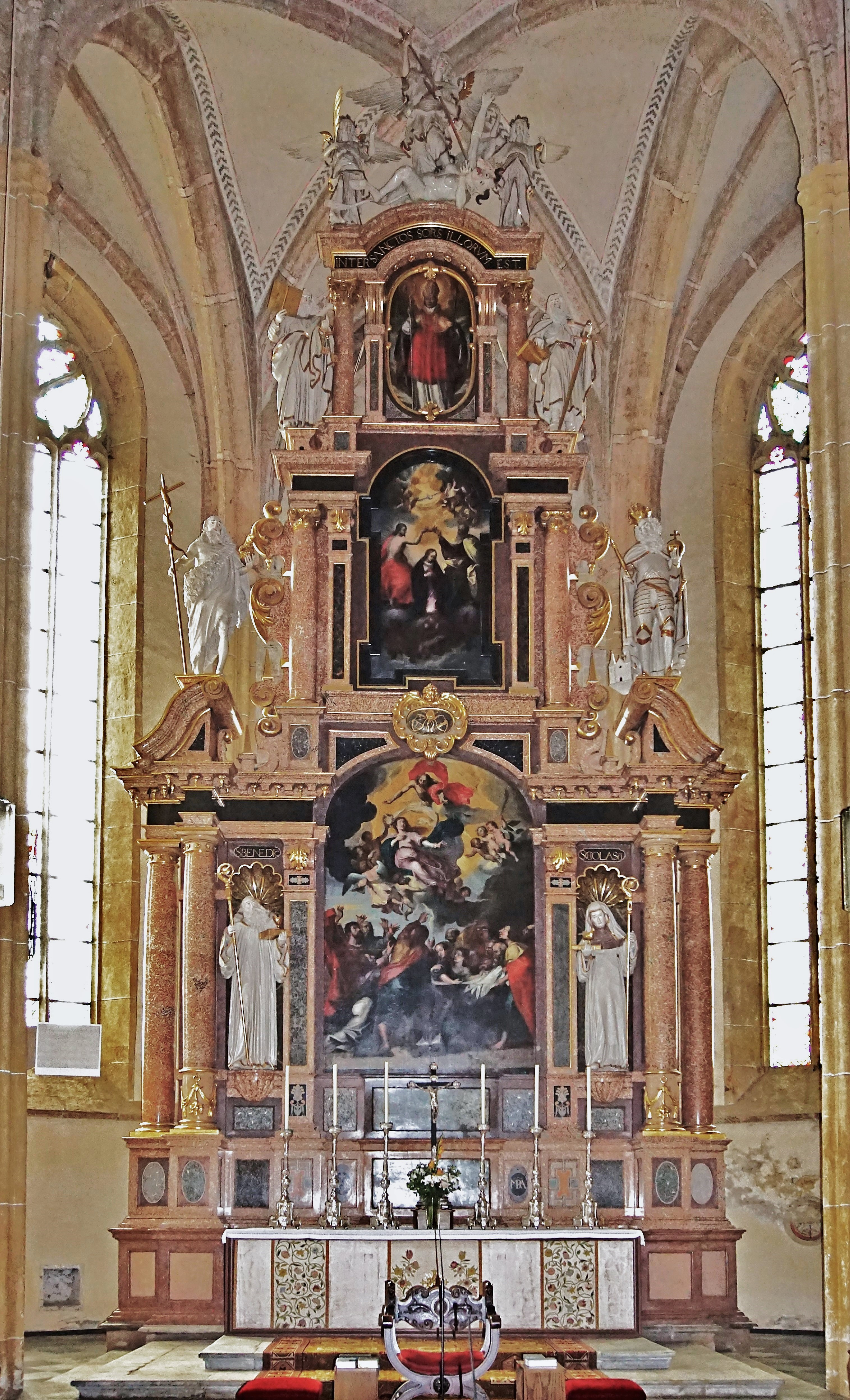 Benediktinerstift St. Lambrecht, Hochaltar der Stiftskirche